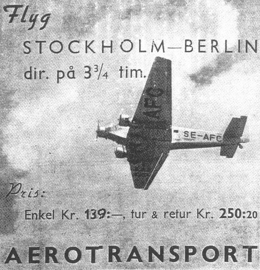 Vanlig reseannons under senare hälften av 1930-talet 45 ÅRS MINNEN FRÅN ABA/SAS FLYGPRESTANDATEKNISKA VERKSAMHET